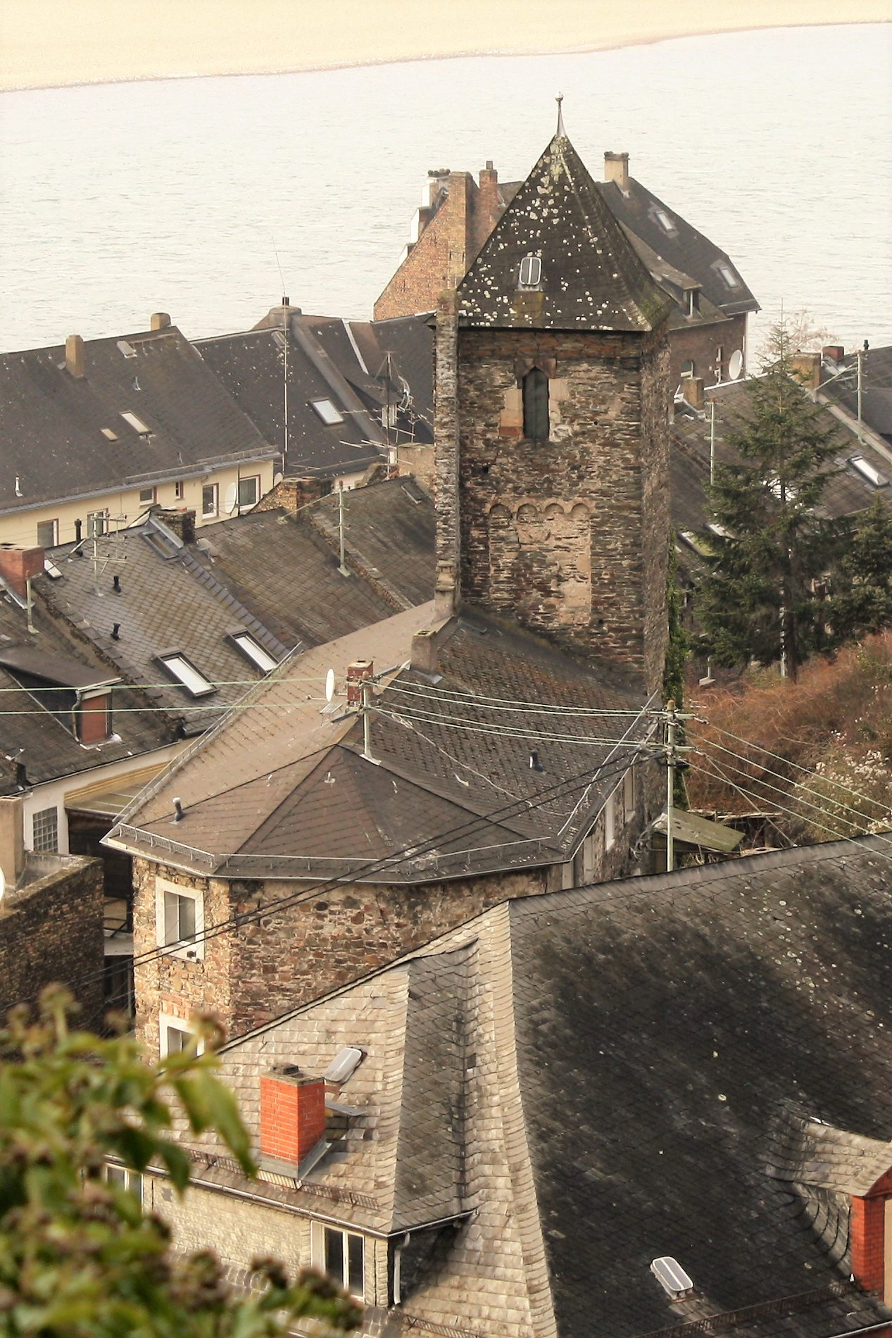 Alte Kirche von Lorchhausen, 1872 ausgebrannt, heute Wohnhaus.